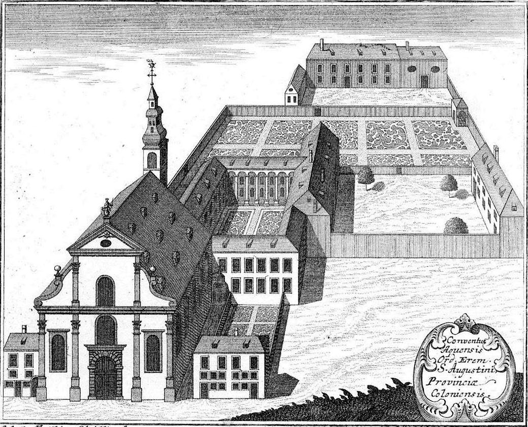 Kupferstich von Johann Matthias Steidlin des ehemaligen Augustinerklosters Aachen